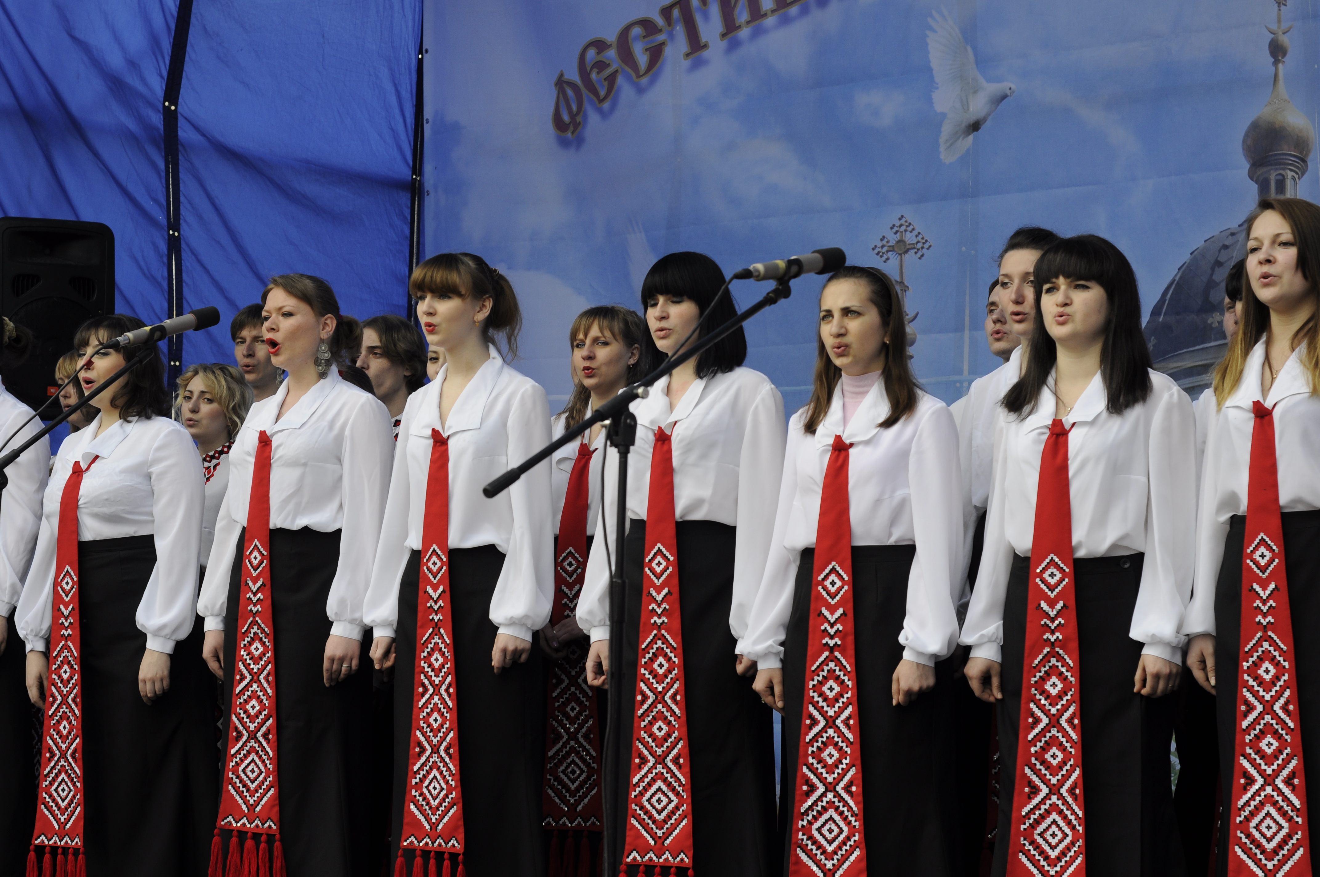 Донецк. Бульвар Пушкина. Фестиваль православной культуры «Пасха Красная» — 2011